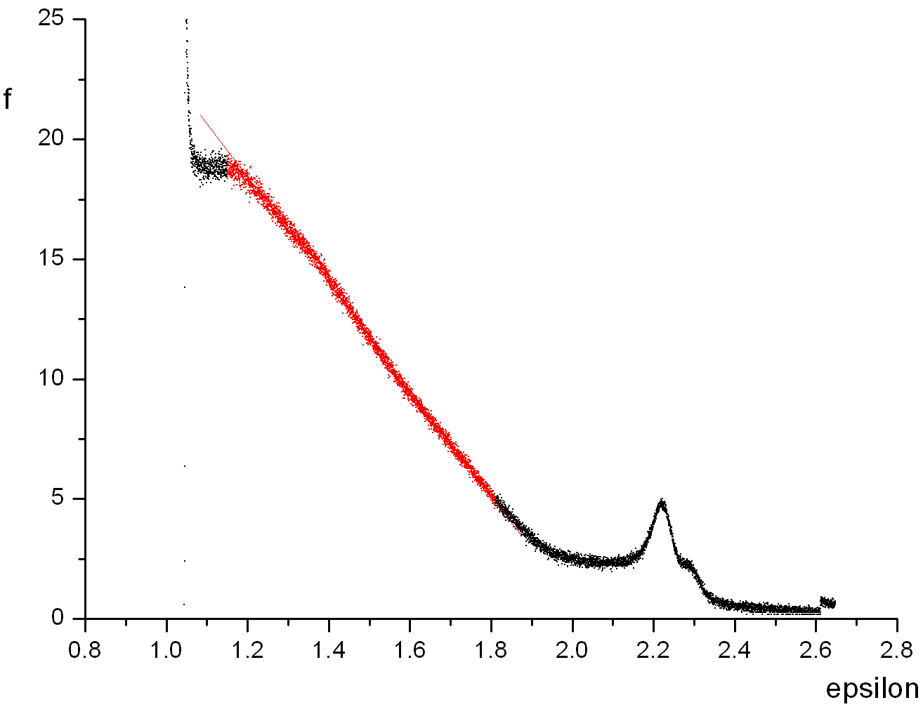 Fermi-Kurie plot for 137Cs